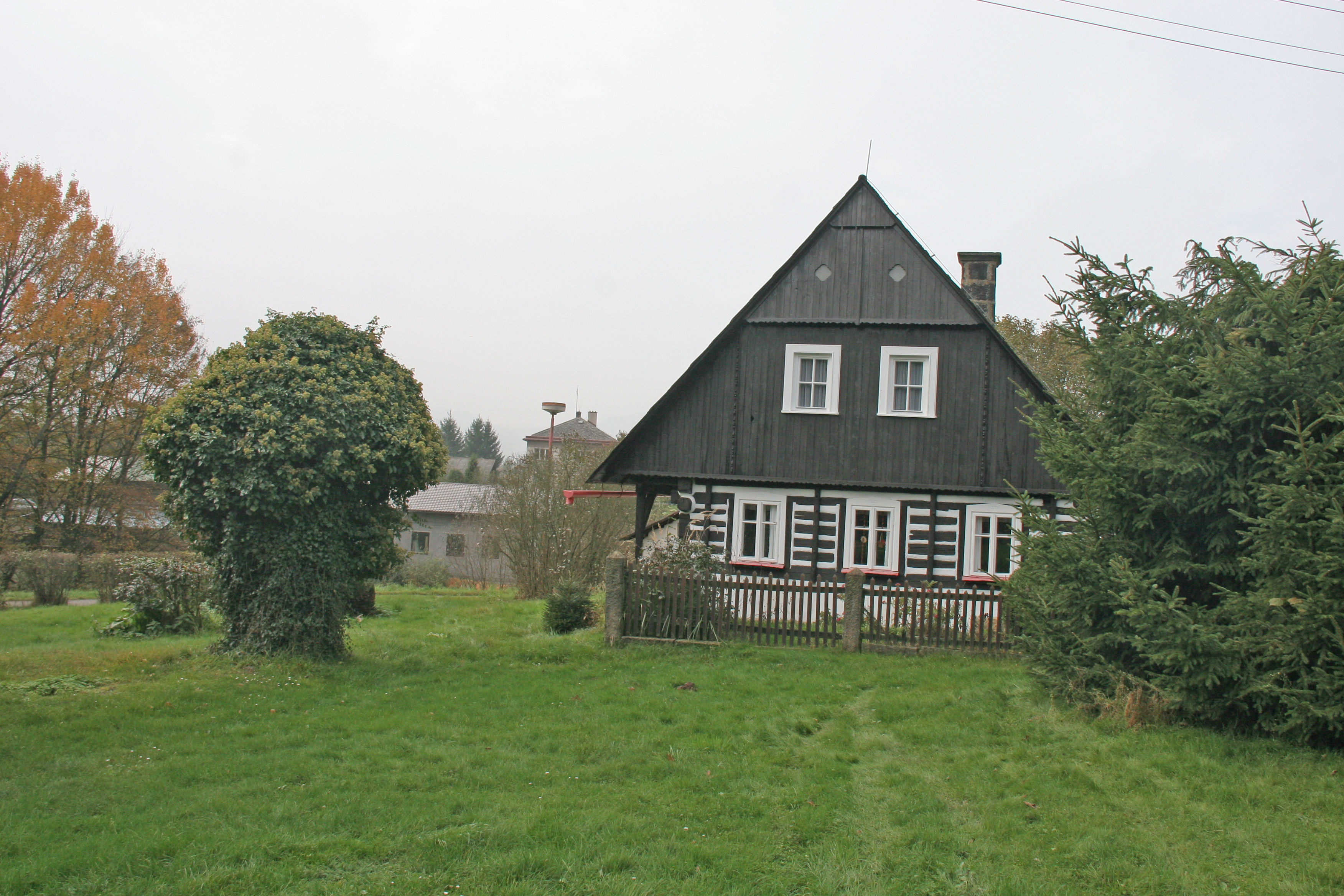 Nový Nemojov 144